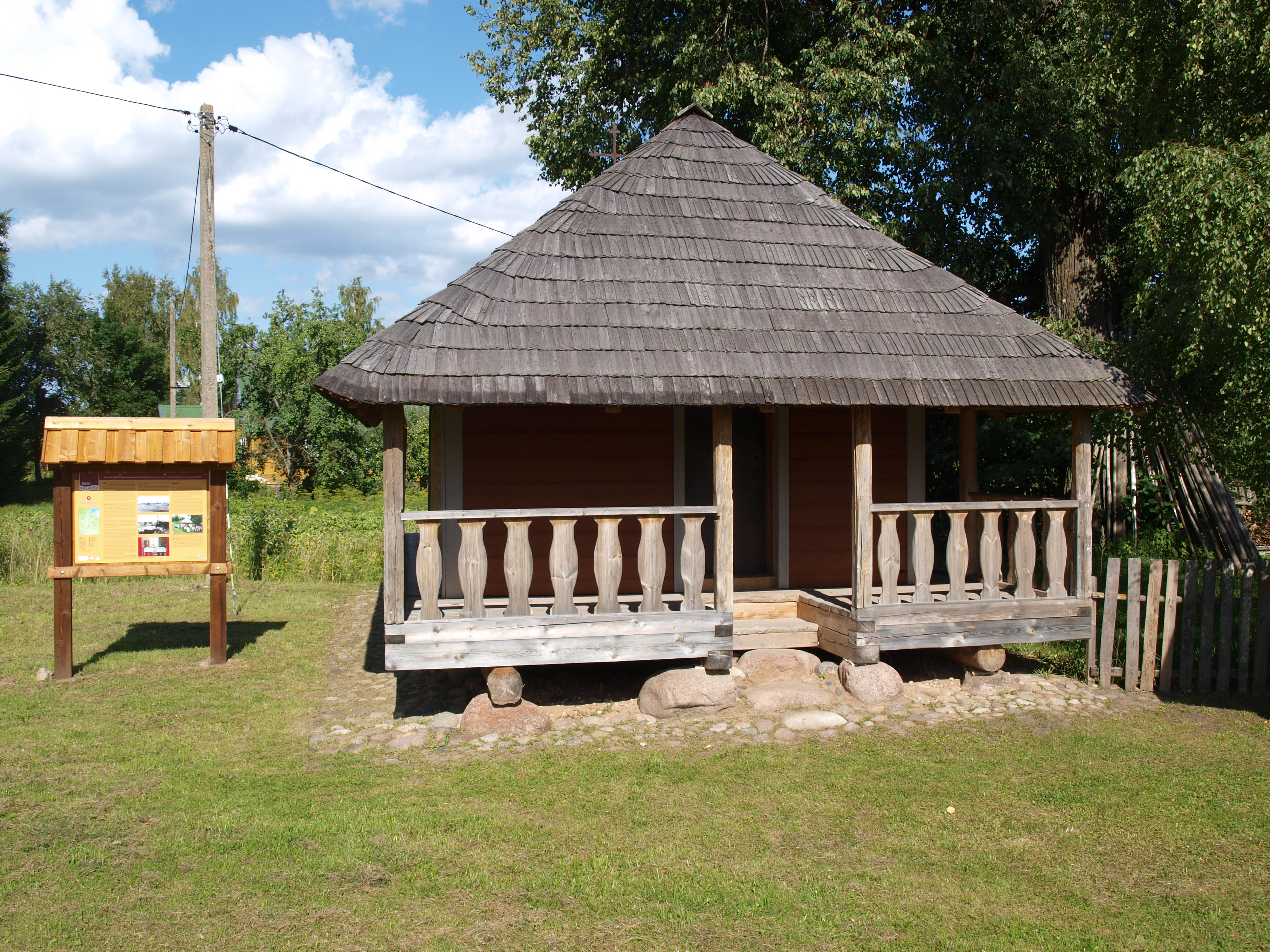 Tsässon väljast